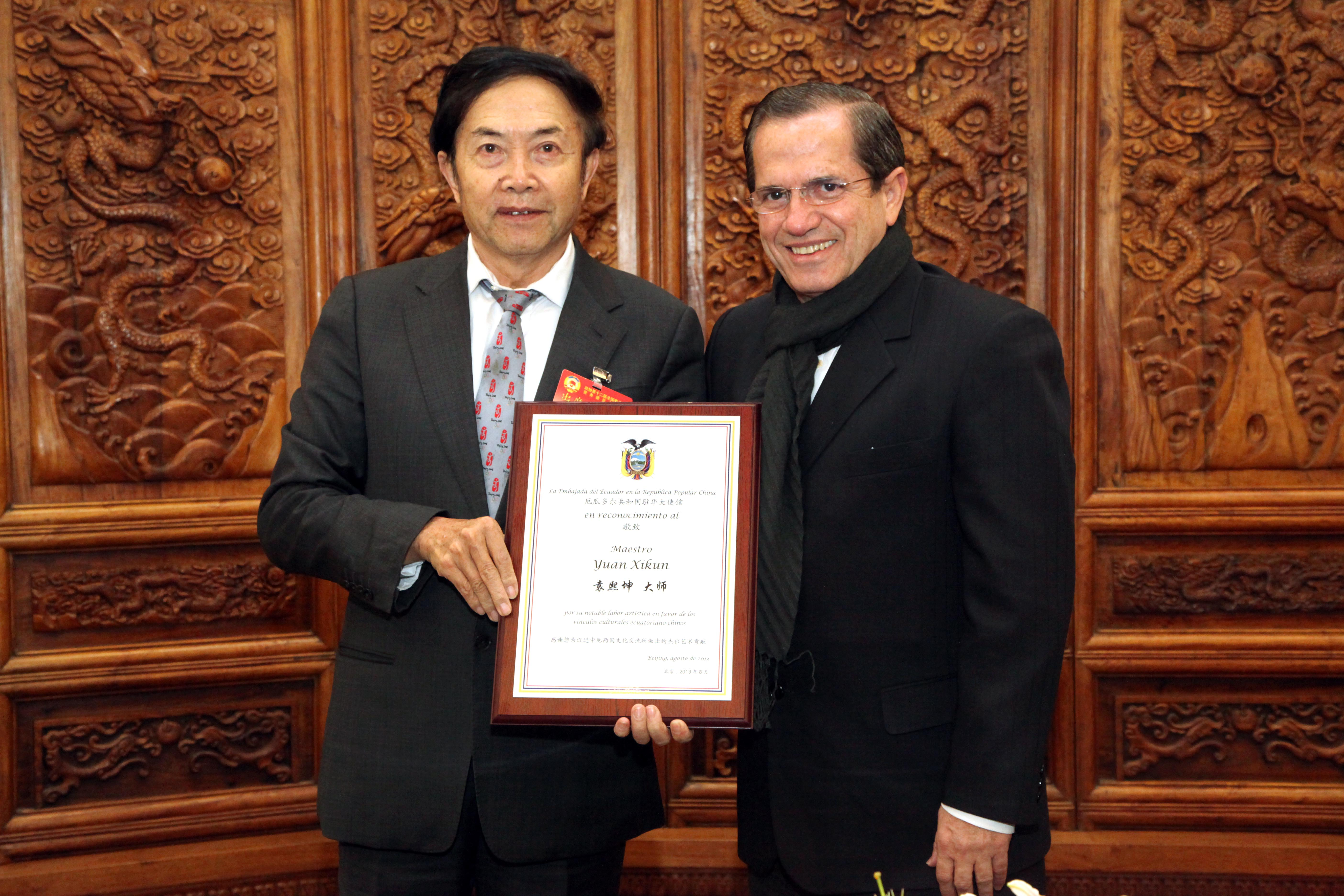 Beijing (China), 18 de noviembre 2013. En exteriores del Museo JINTAI, ubicado en el parque de Chaoyang, se realizó la colocación de la Ofrenda Floral al Busto de Eloy Alfaro por parte del artista chino Yuan Xikun, creador de dicho busto y fundador del Museo Jintai. Foto: Fernanda LeMarie - Cancillería del Ecuador.